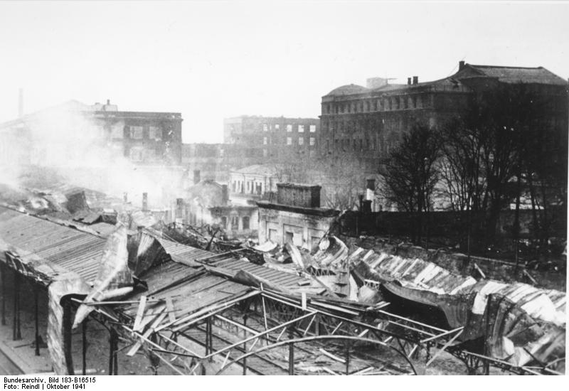 Scherl: An der Sowjetfront: Zerstörter Bahnhof von Charkow. PK-Kriegsberichter: Reindl 9687-41 Okt.41 Information added by Wikimedia users. Управление ЮЖД и перроны Южного вокзала со Свердловского виадука. Октябрь 1941 (после 25)